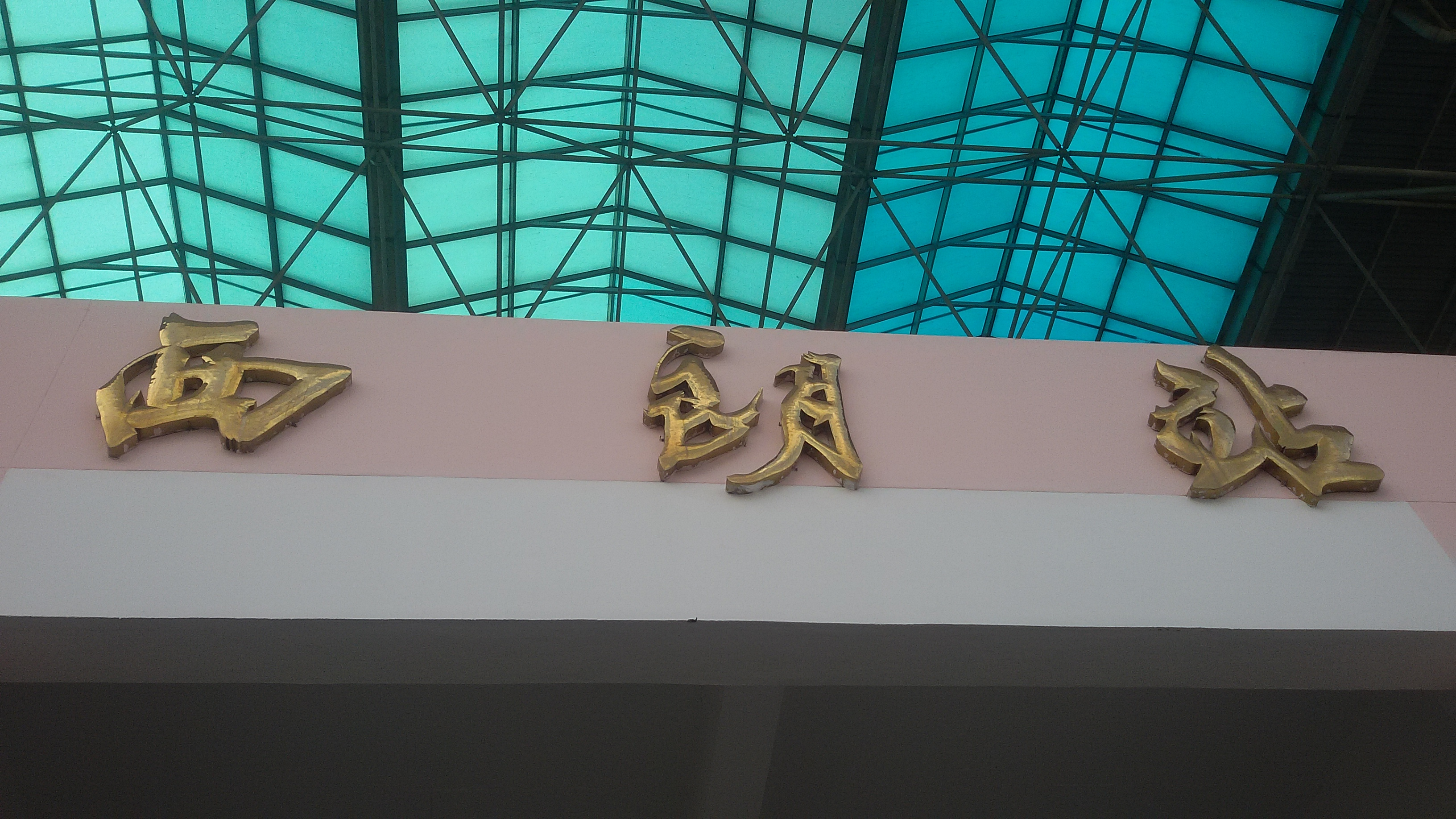 粵語: 西朗站A出入口頭頂嘅鑲金字